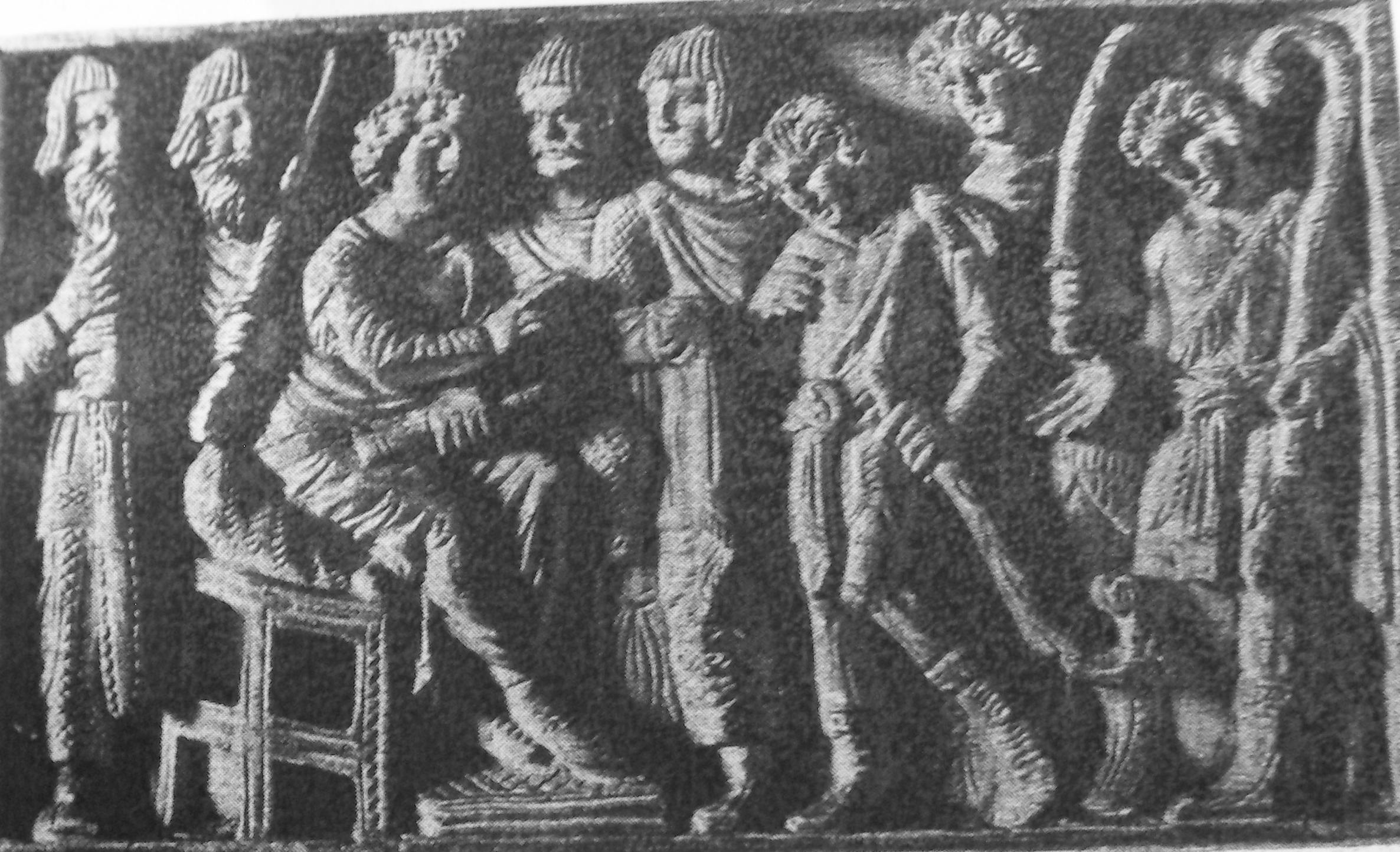 catedra